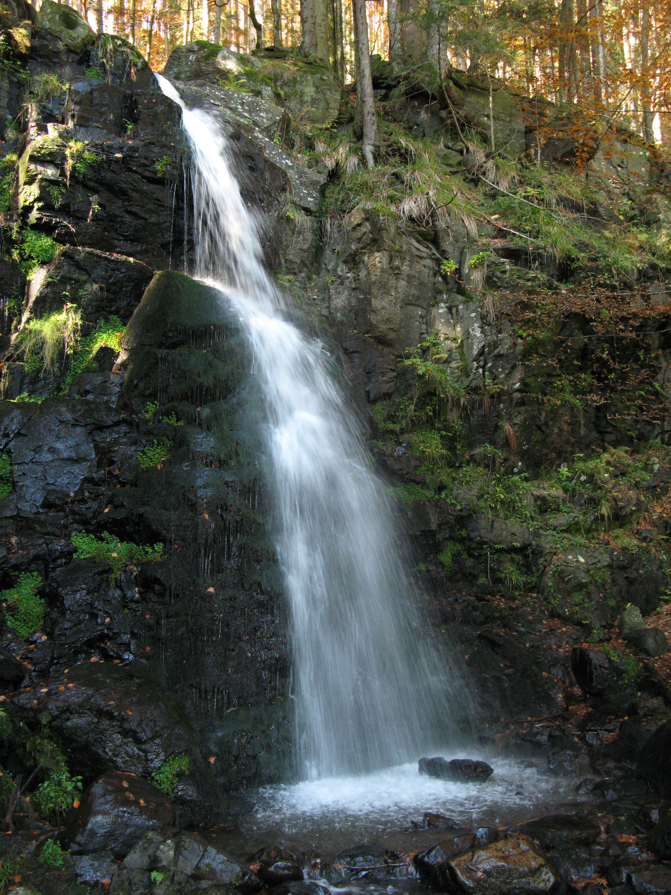 Die obere Stufe der Zweribachwasserfälle am Zweitälersteig im Simonswäldertal im Schwarzwald.